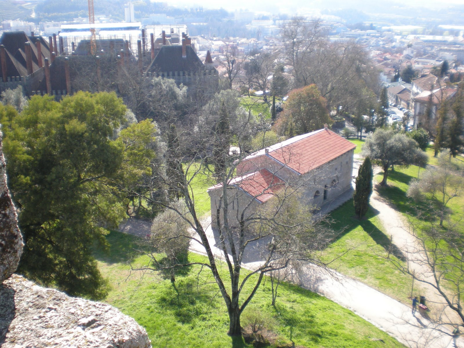 Colina Sagrada vista do Castelo de Guimarães.